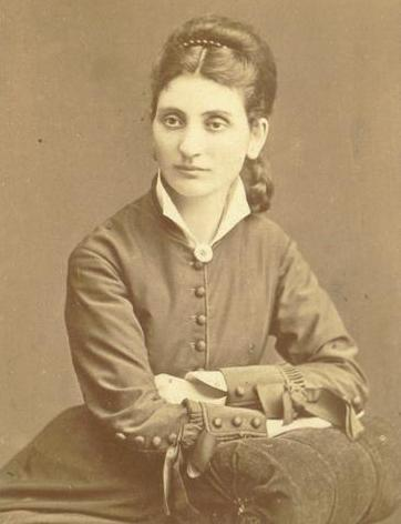 ანასტასია მიხეილის ასული თუმანიშვილი-წერეთელი (1849-1932).